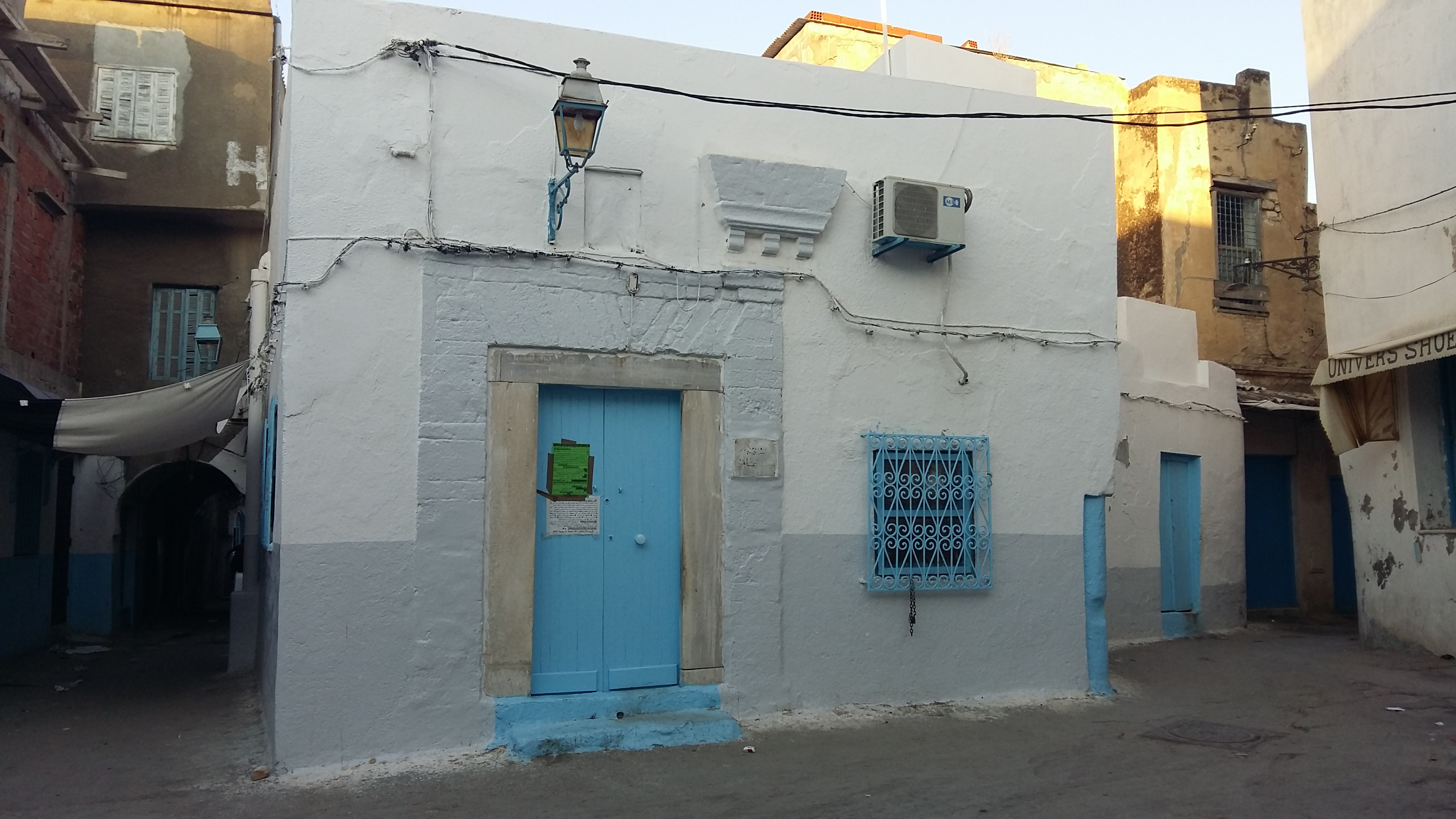 Mesjed Sidi Ameur